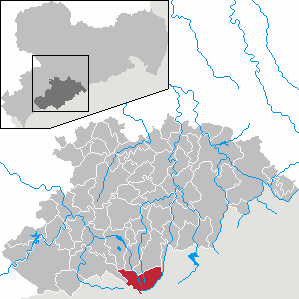 Oberwiesenthal im Erzgebirgskreis, Sachsen